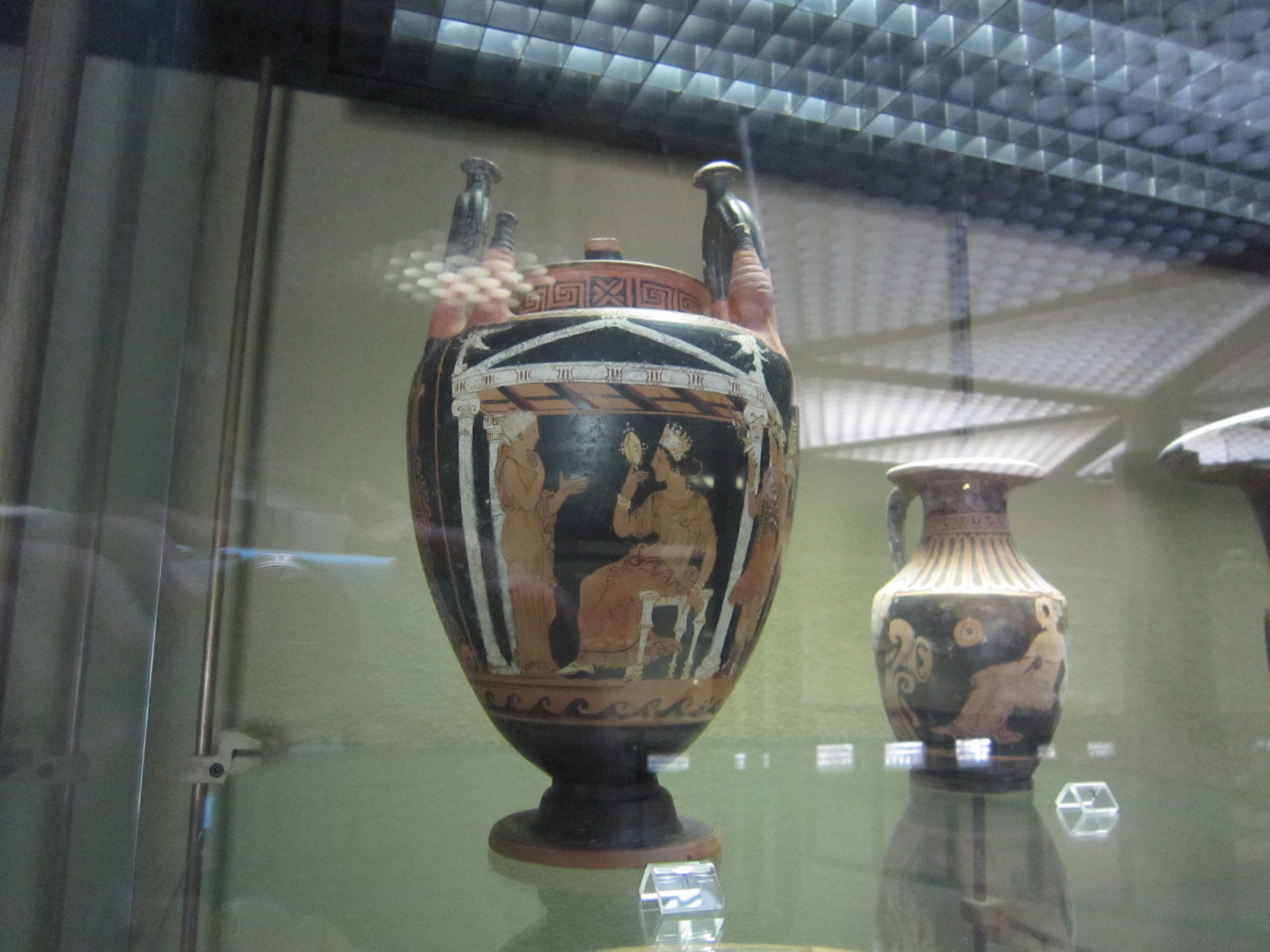 Vaso greco